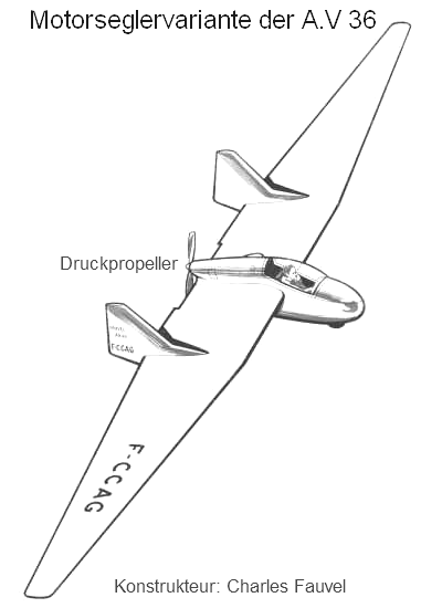 Motorsegler Variante AV.36